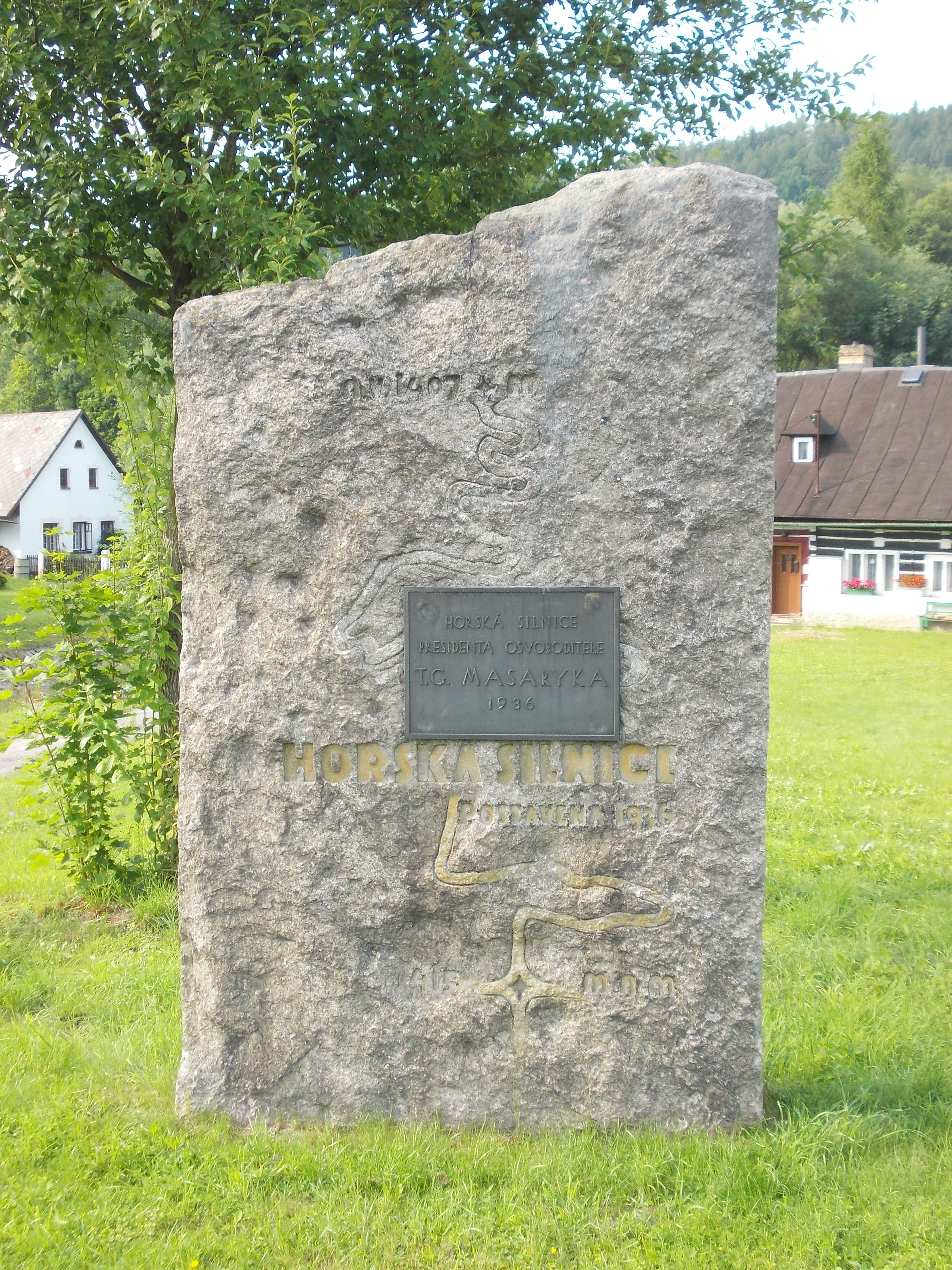 Hrabačov - památník stavby Masarykovy horské silnice